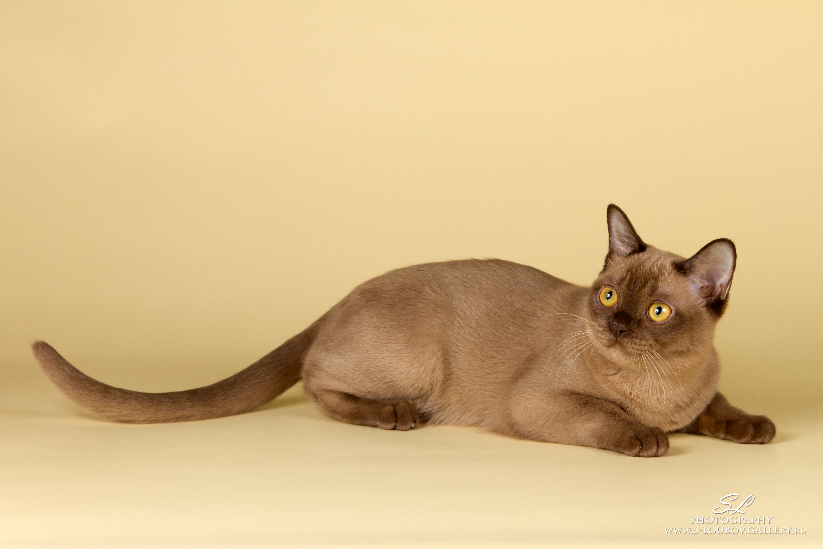 котенок американской бурмы традиционных линий окраса шампань